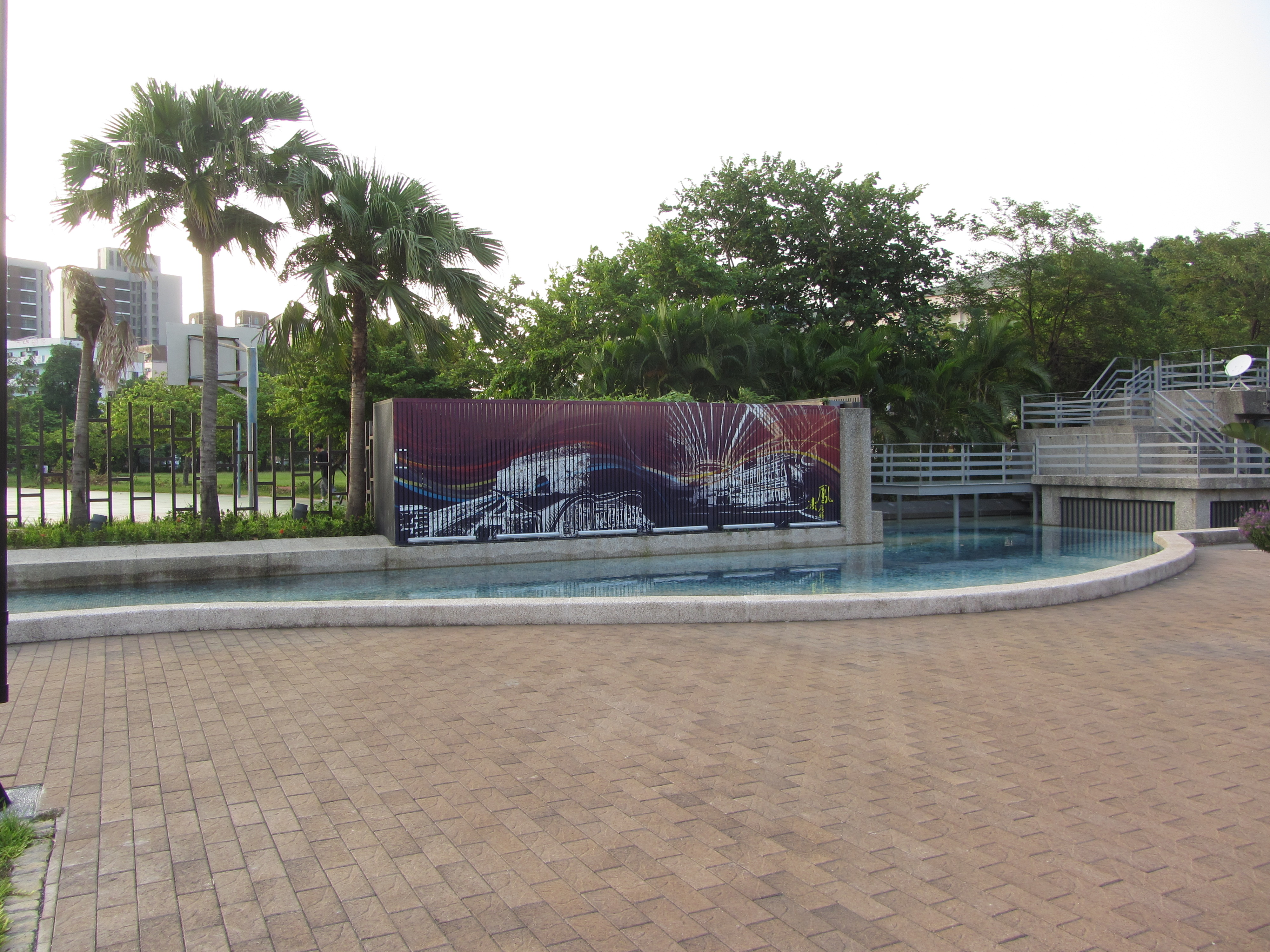 高雄市鳳山區鳳凌廣場。